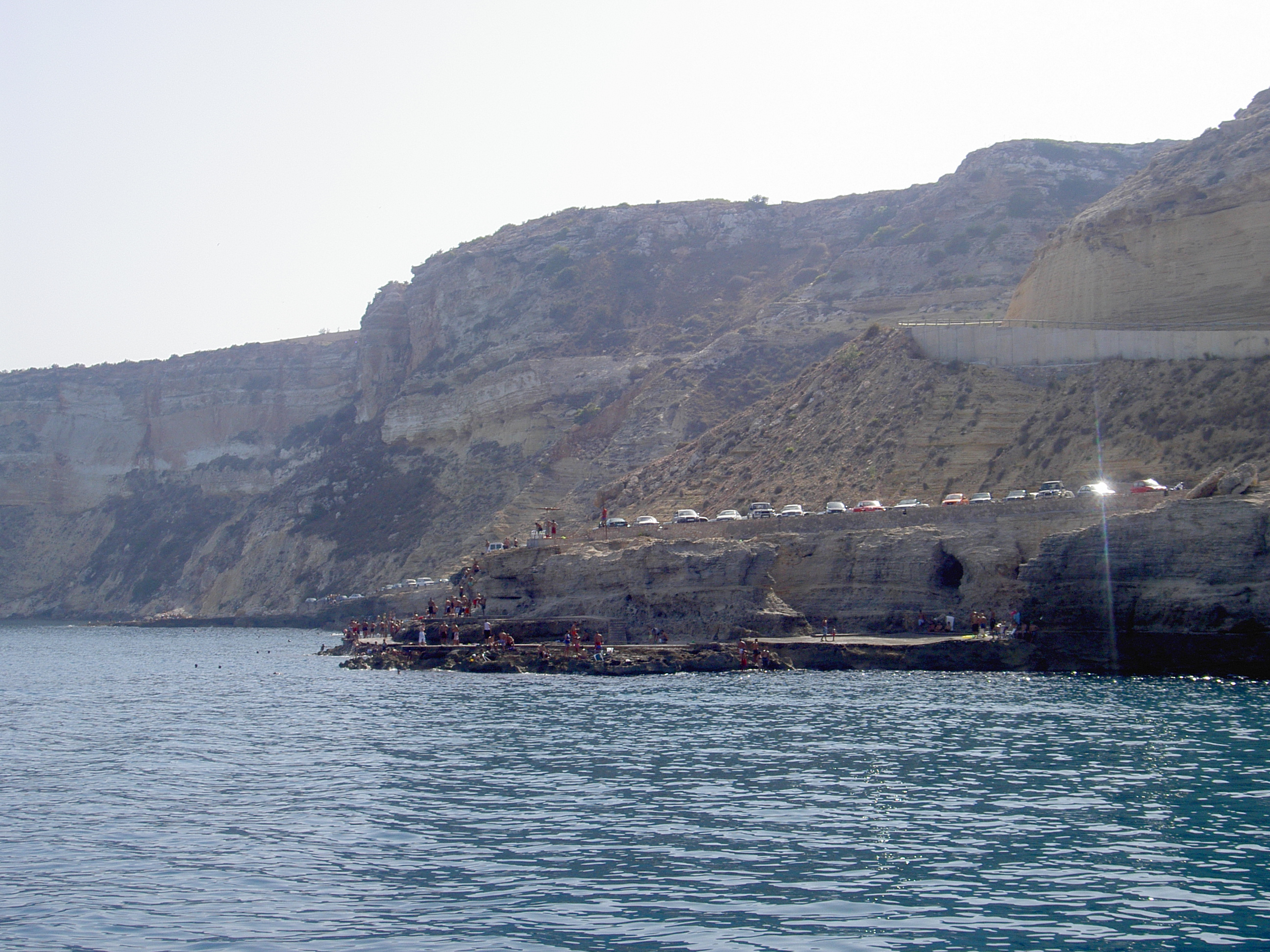 Aguadú